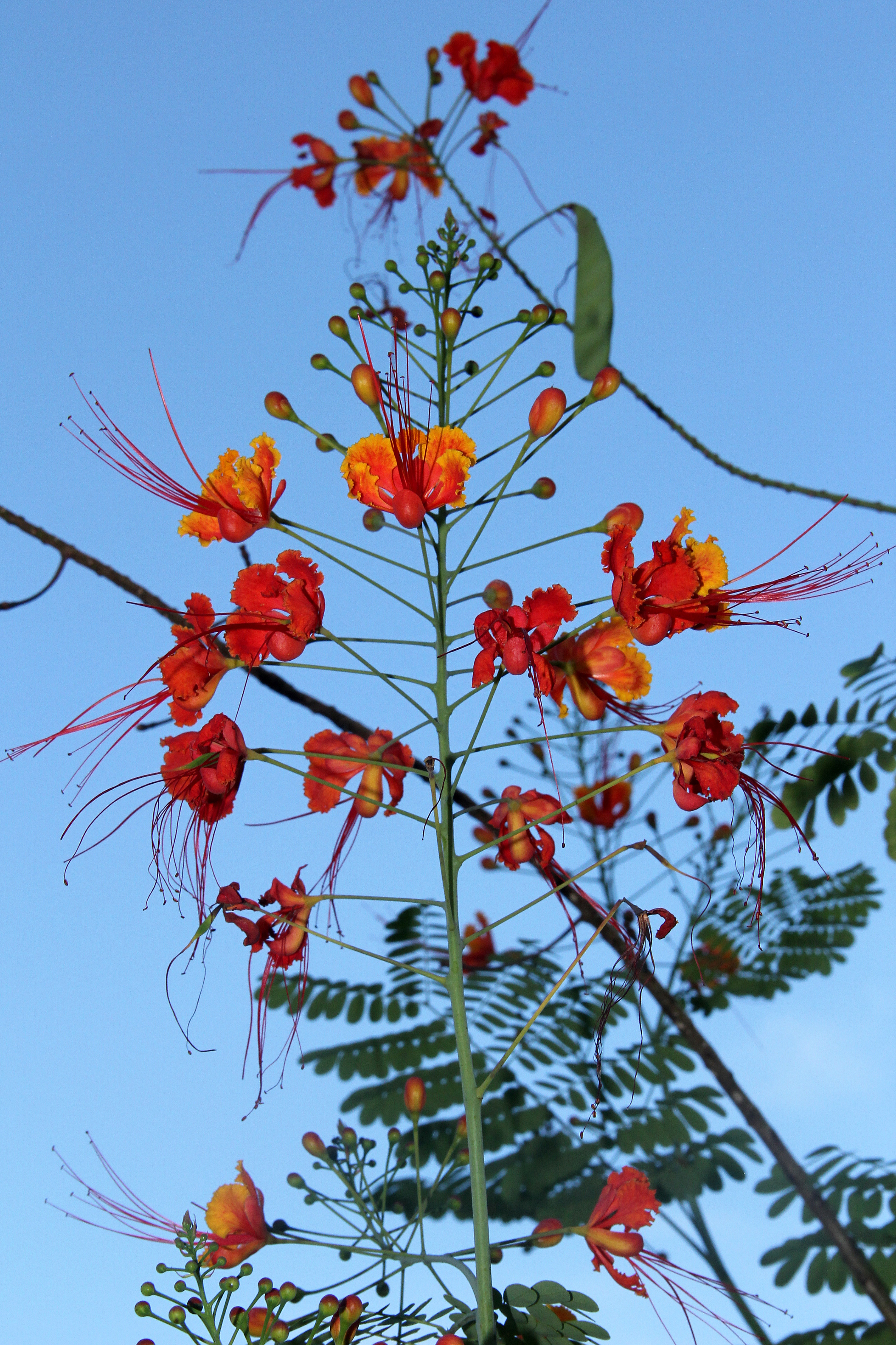 Caesalpinia pulcherrima